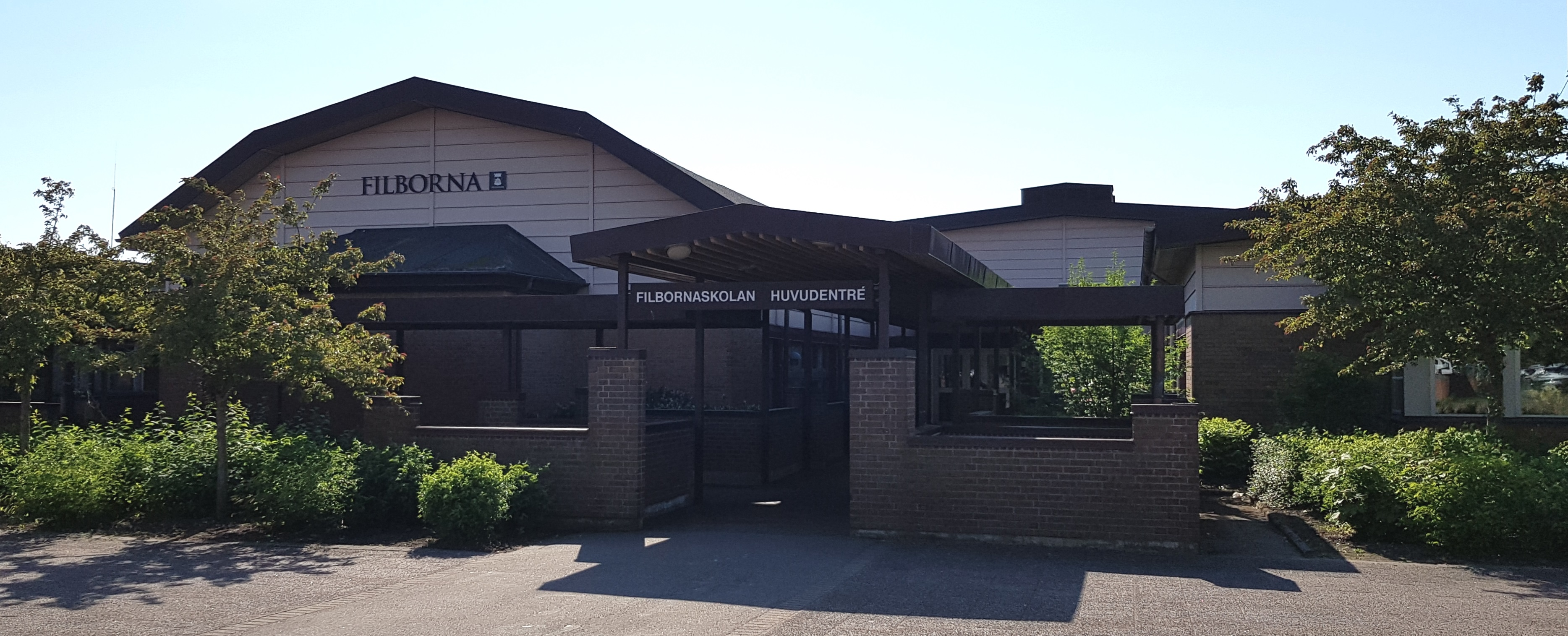 Filbornaskolan i Helsingborg.